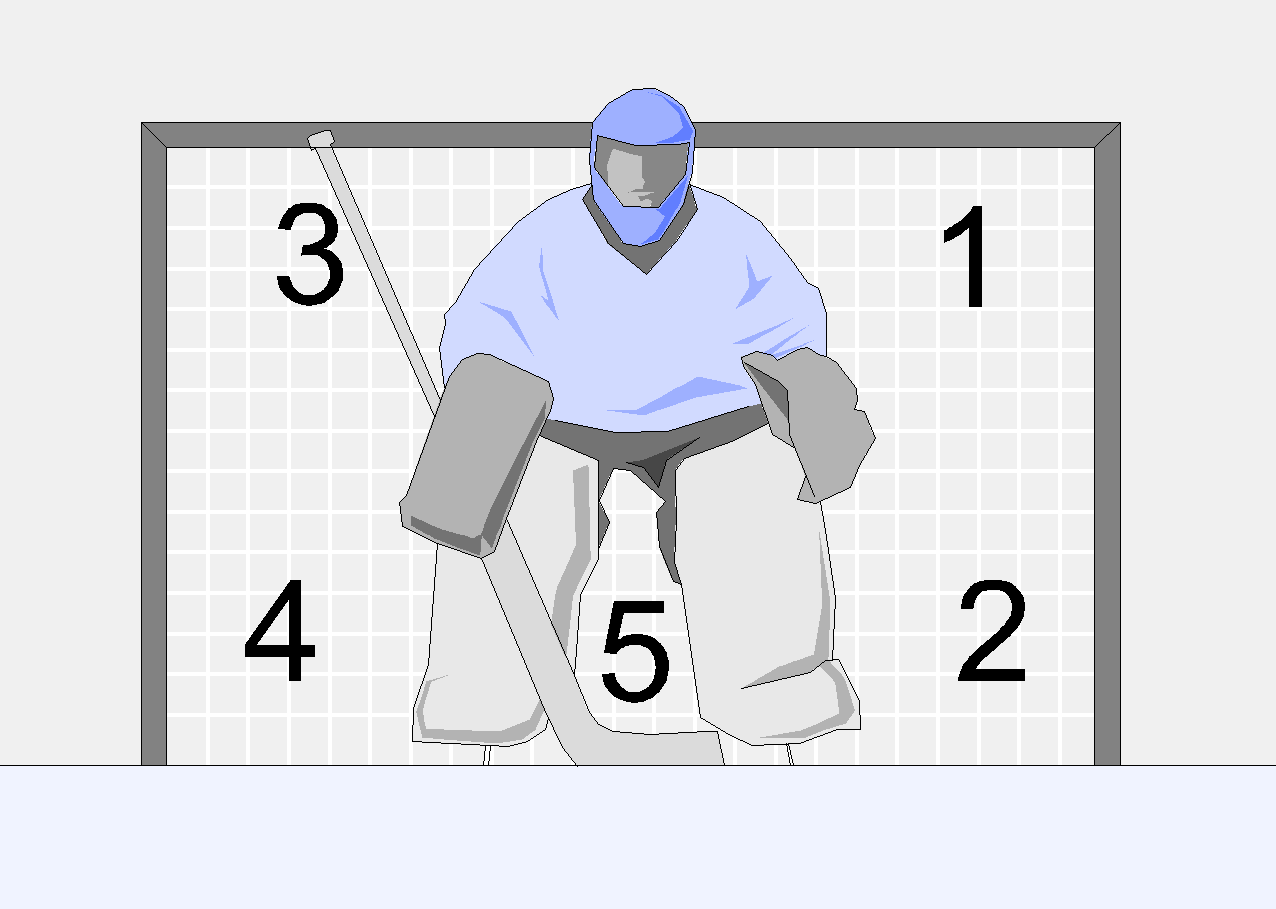 Darstellung der holes bei einem Eishockeytorhüter